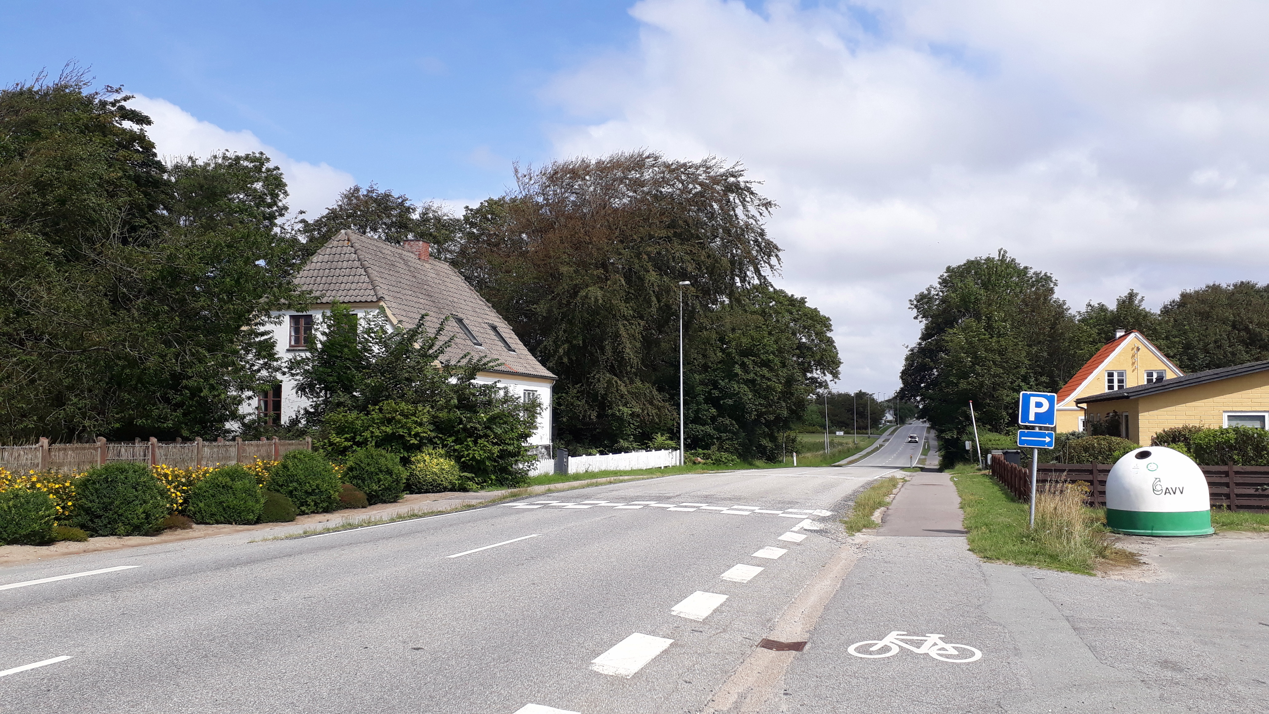 Gølstrup, Danmark